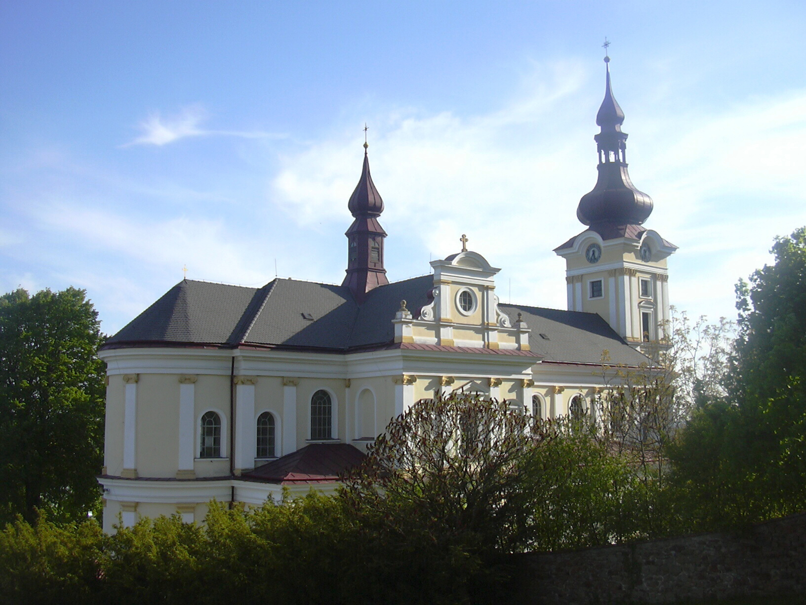 Pustiměř - kostel svatého Benedikta (Vyškov District, Czech Republic)